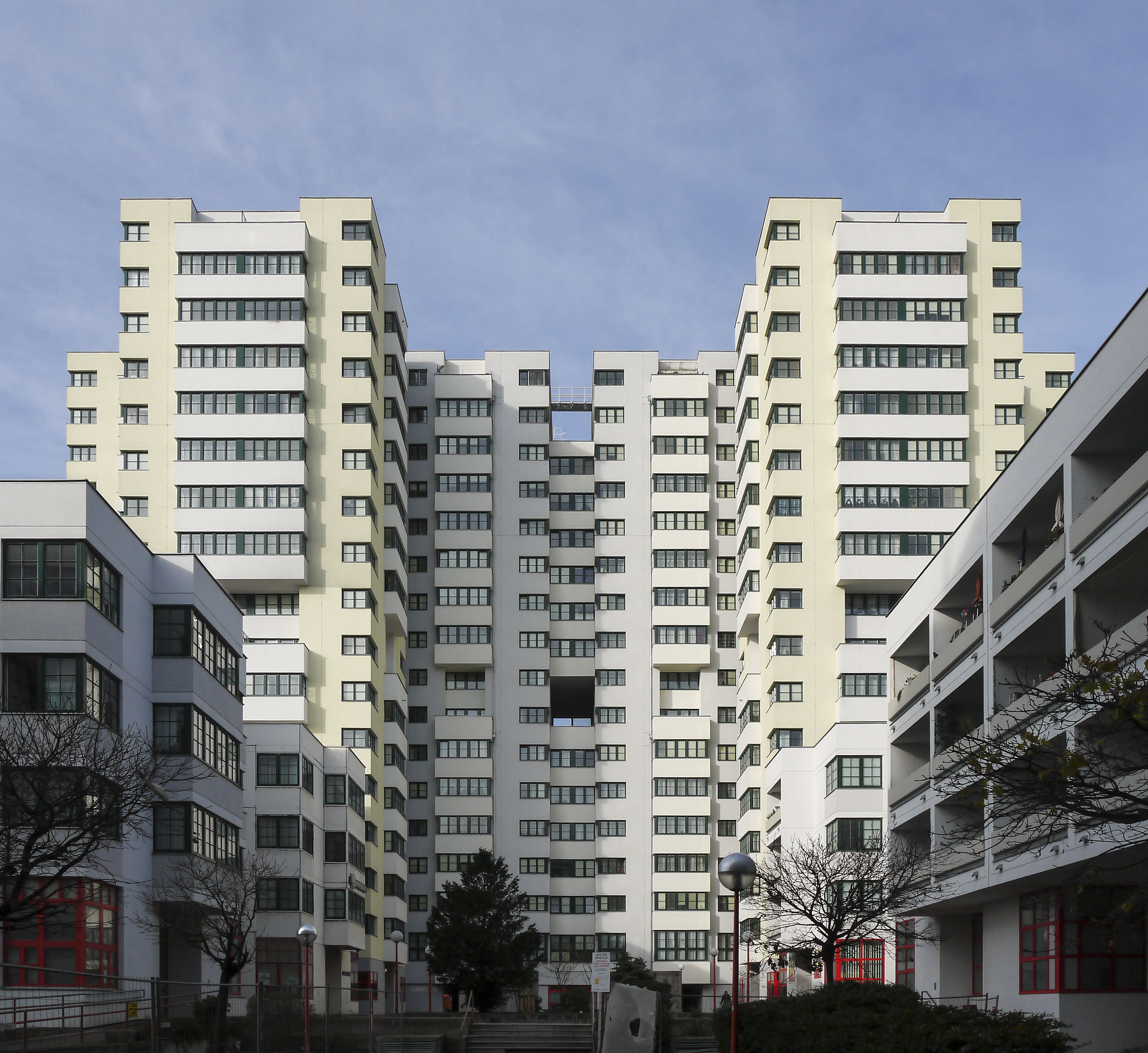 Am Schöpfwerk